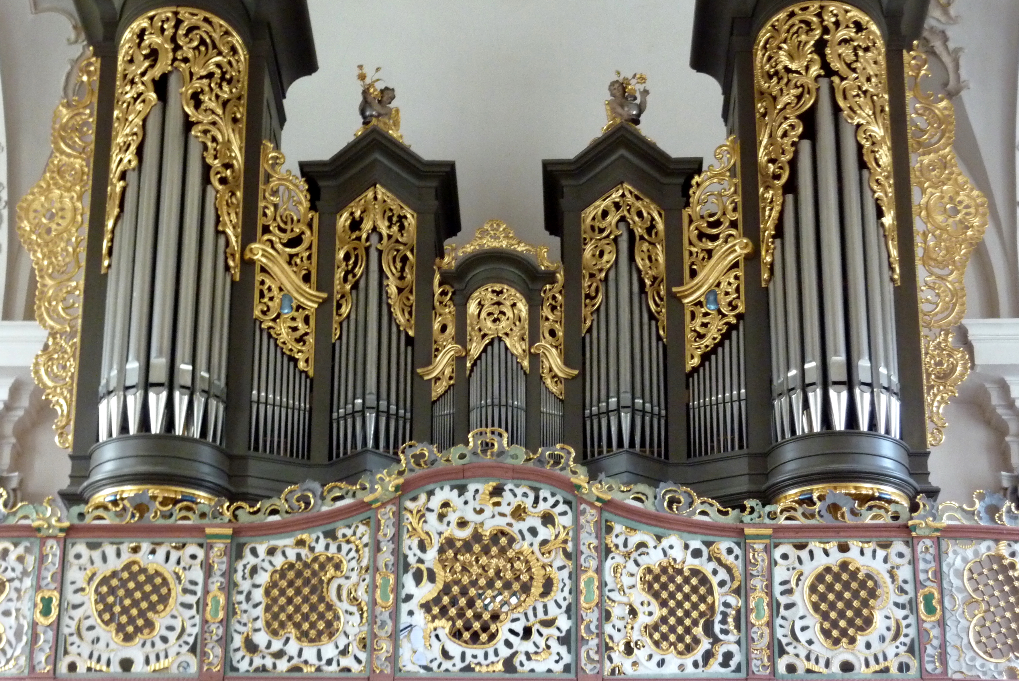 Pfarr- und Wallfahrtskirche St. Michael in Violau (Altenmünster), Orgel von 1781, restauriert 1972 von der Orgelbaufirma Sandtner in Dillingen an der Donau